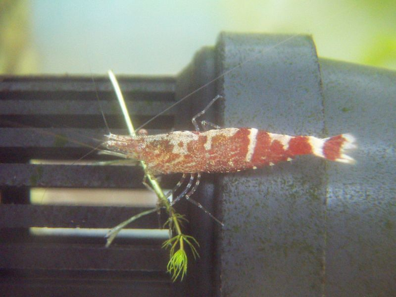 Caridina serratirostris(ヒメヌマエビ),Female(メス),横しまがある個体